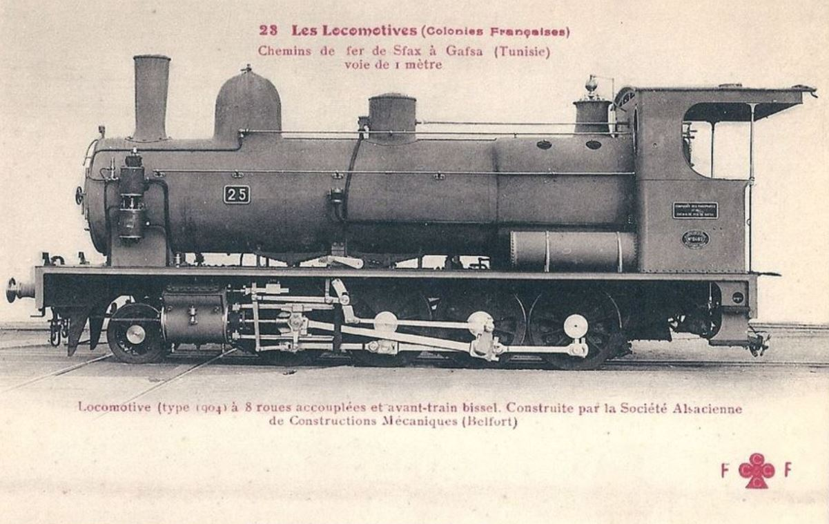 Locomotive (type 1904) à 8 roues accouplées et avant-train bissel. Construite par la Société Alsacienne de Constructions Mécaniques (Belfort). Carte postal No. 23 de la serie 'Les Locomotives'